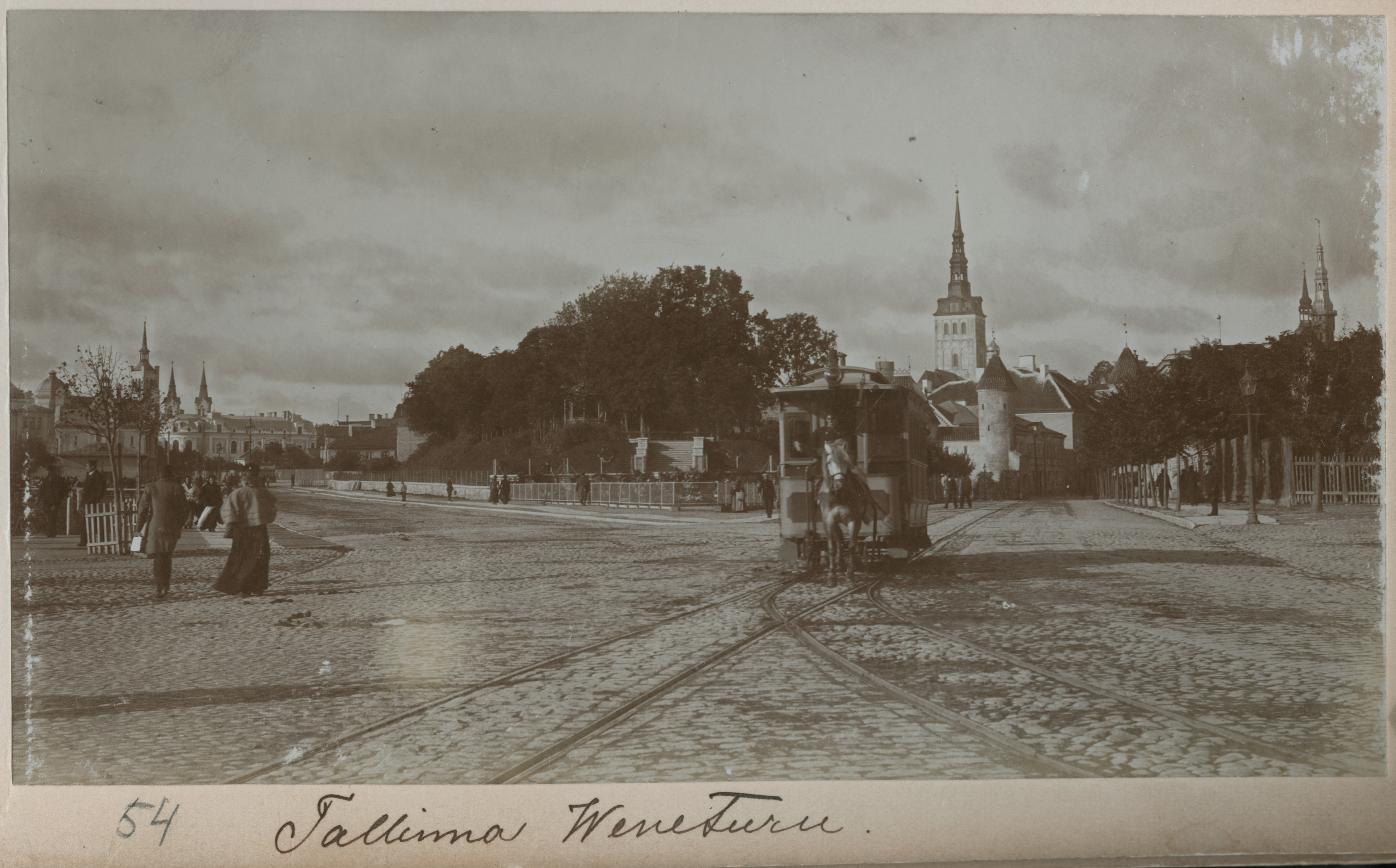 konka Vene turul